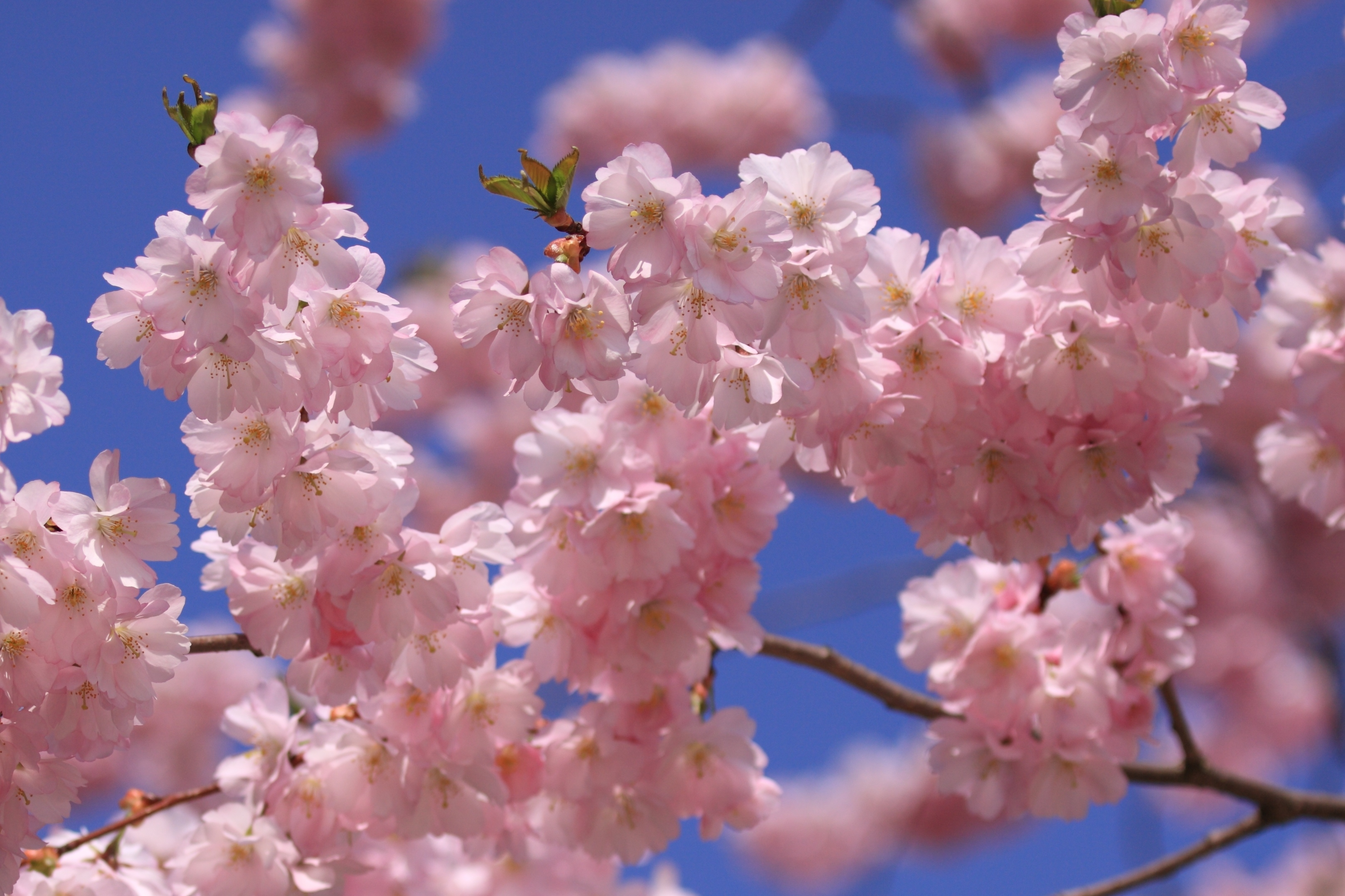 Sakura blossoms